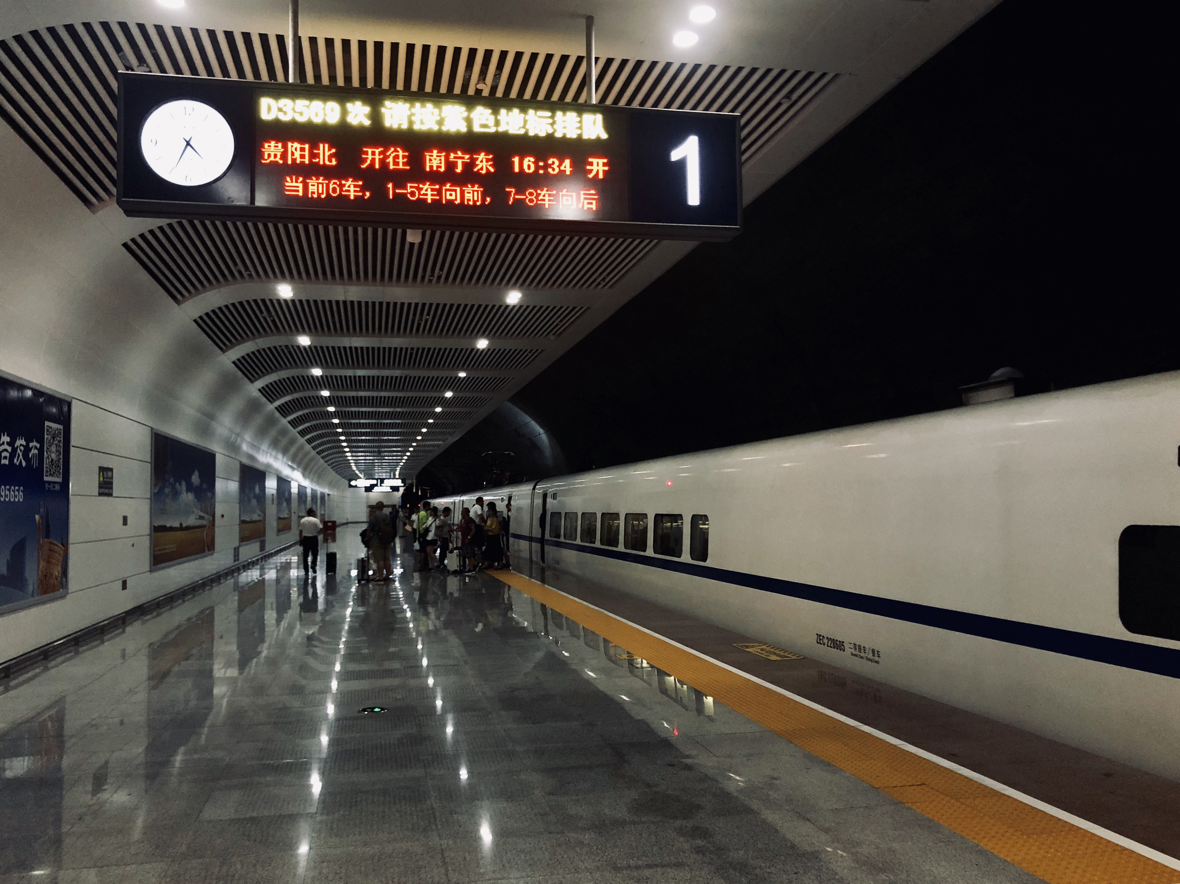 中文（中国大陆）: CRH2A-2286 担当 D3568 停靠龙洞堡站